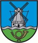 Die Windmühle deutet auf den Ortsteil Kampen hin. Die Wellenleiste symbolisiert die das Gebiet kreuzende Este und das Posthorn die frühere Relaisstation an der Strecke zwischen Harburg und Celle.